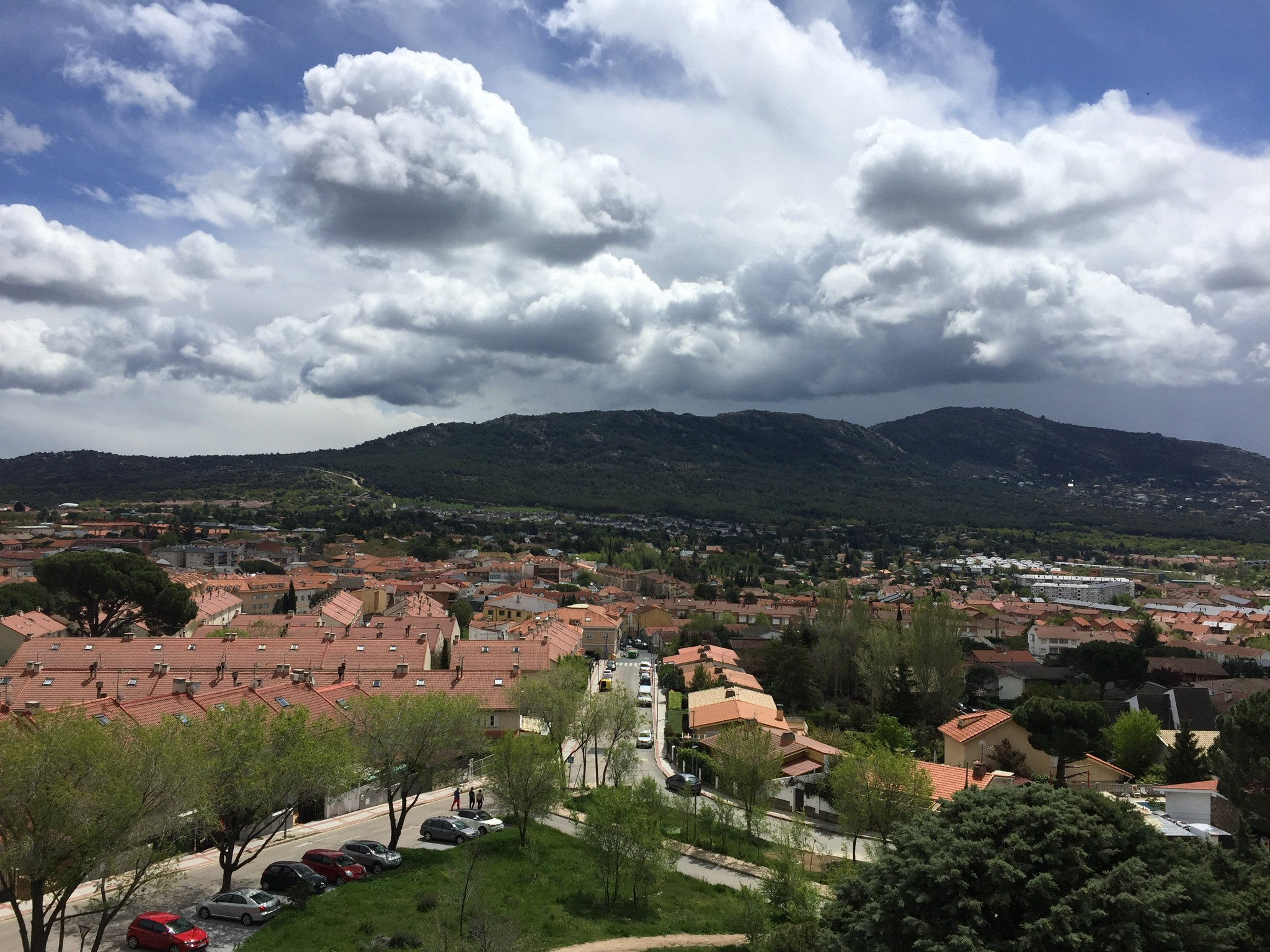 Vista parcial de Moralzarzal, Madrid, España